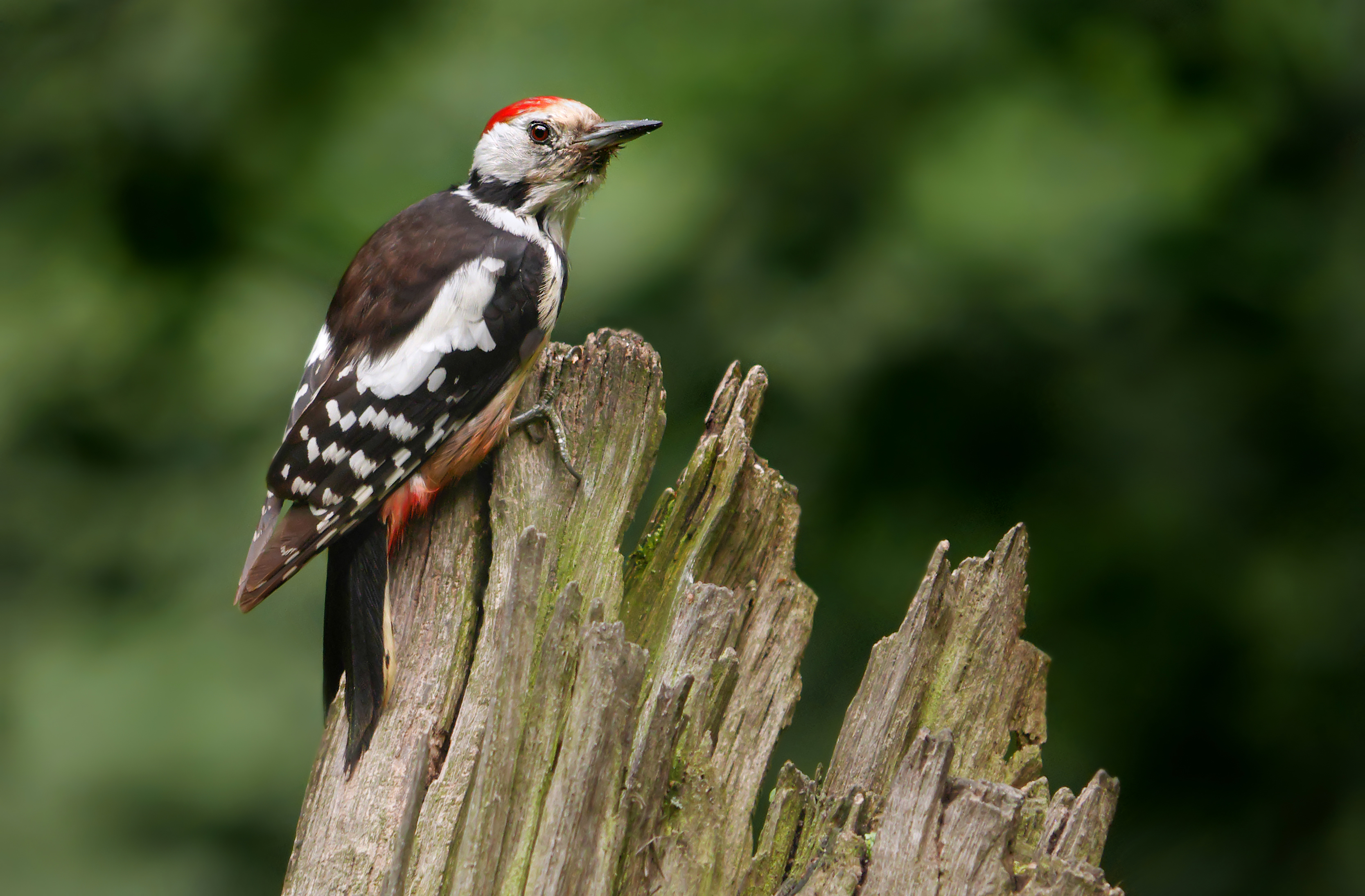 Panasonic GX7 + Panasonic Lumix G Vario 100-300, O.I.S